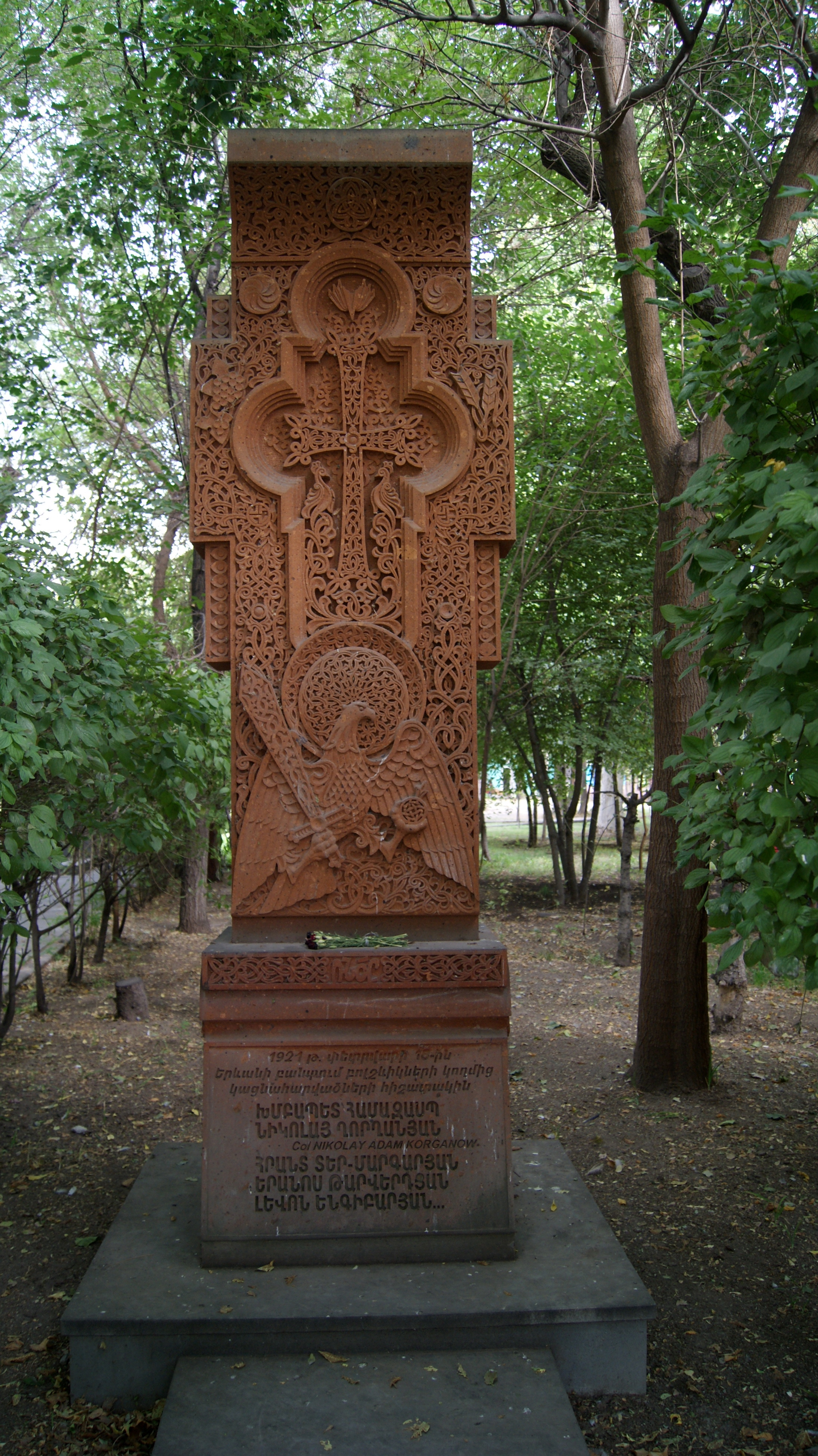 Բոլշևիկների կողմից կացնահարվածների հիշատակյին 6/64